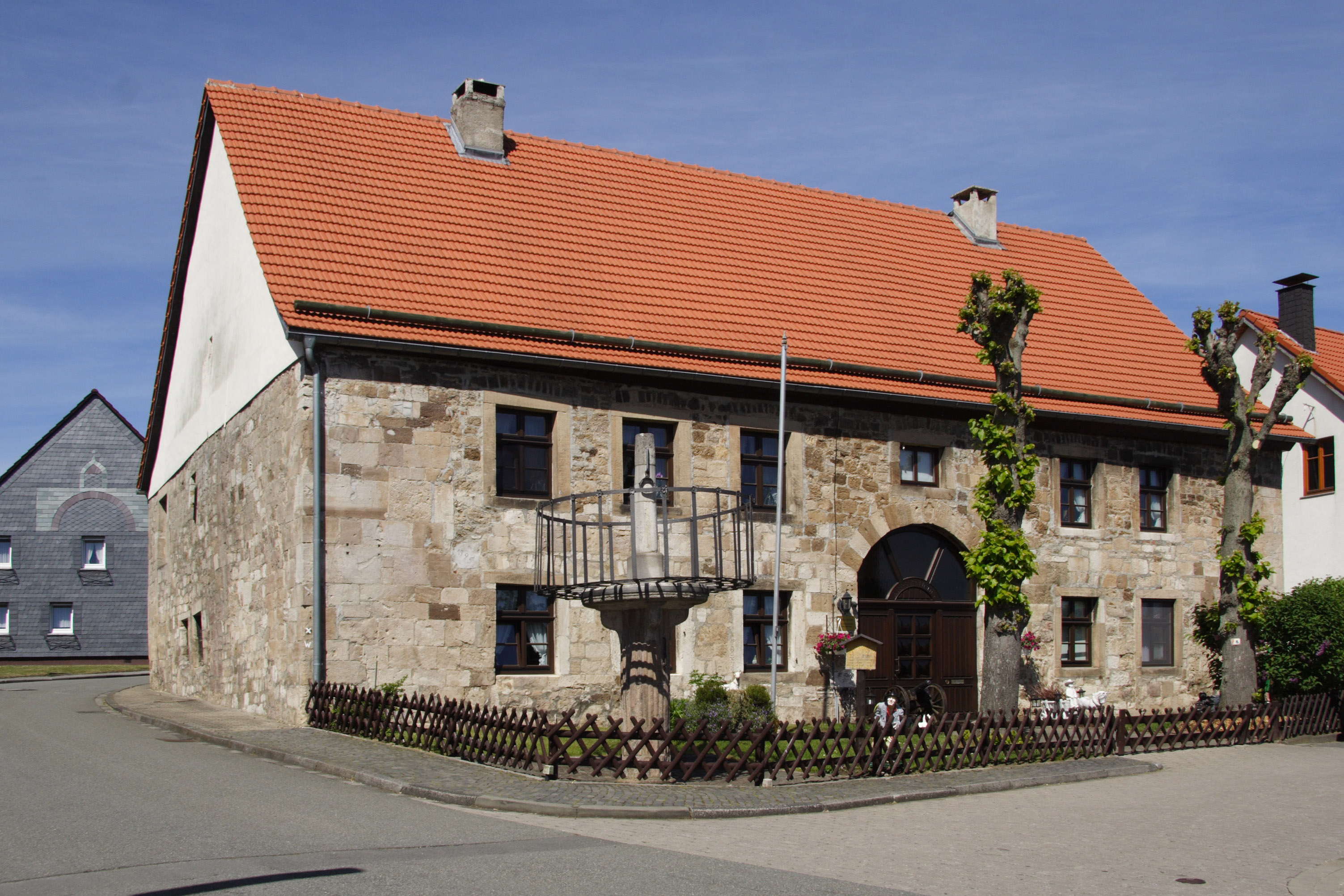 Altes Rathaus in Obermarsberg mit Pranger.